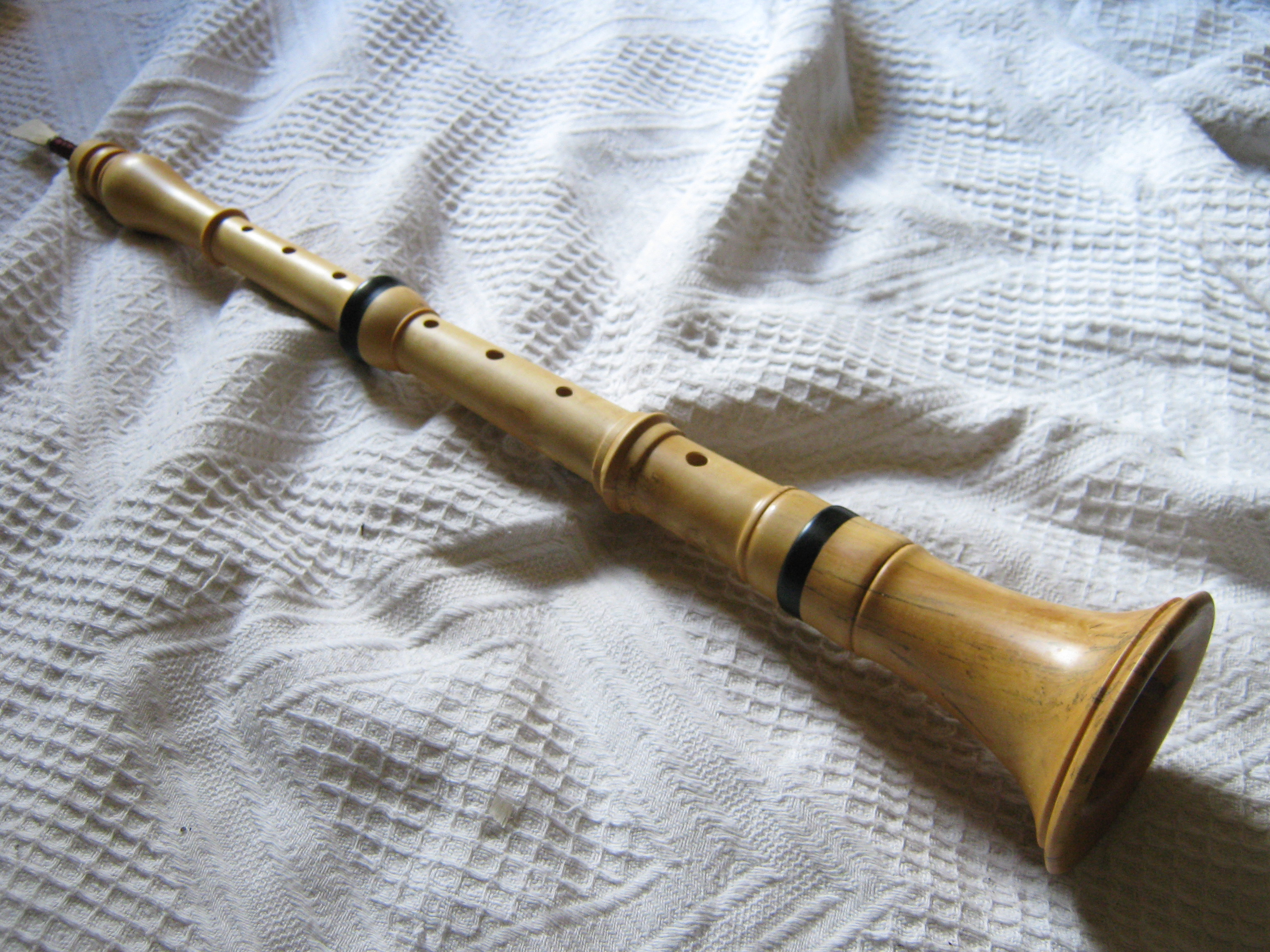 Le autbòi est fait de trois parties en buis, muni d'une anche double. Dans la plaine languedocienne il a une tonalité ré/sol.